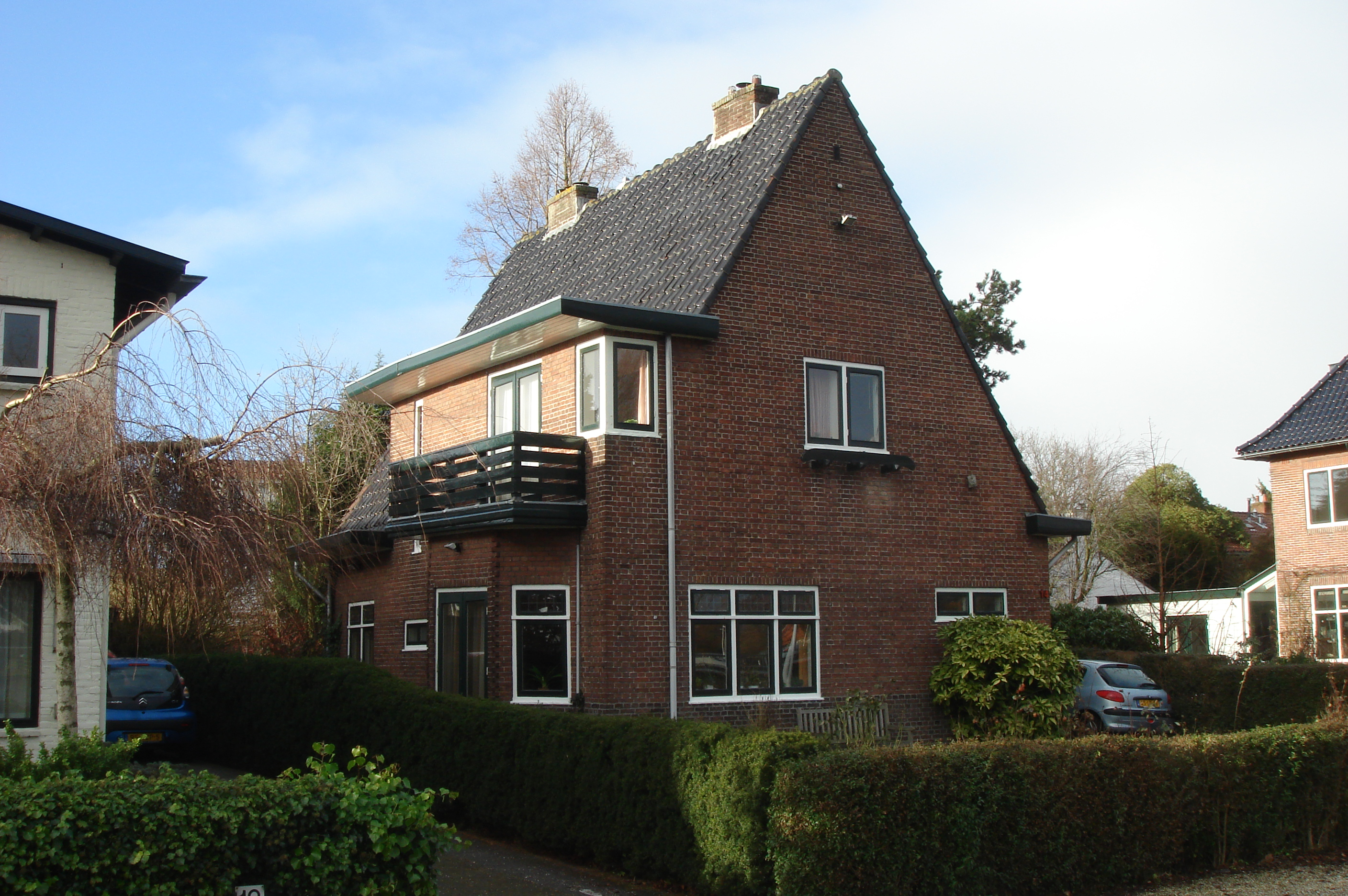 Scheltemakade 14 in Haarlem, de woning van Anton Steenwijk in de film. Foto: Daniel van der Ree, 2 januari 2011